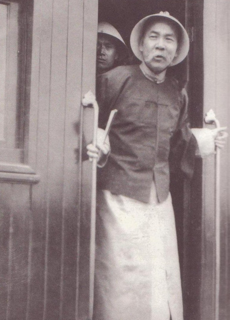 中文（香港）: 周壽臣仕鐵路總辦時攝